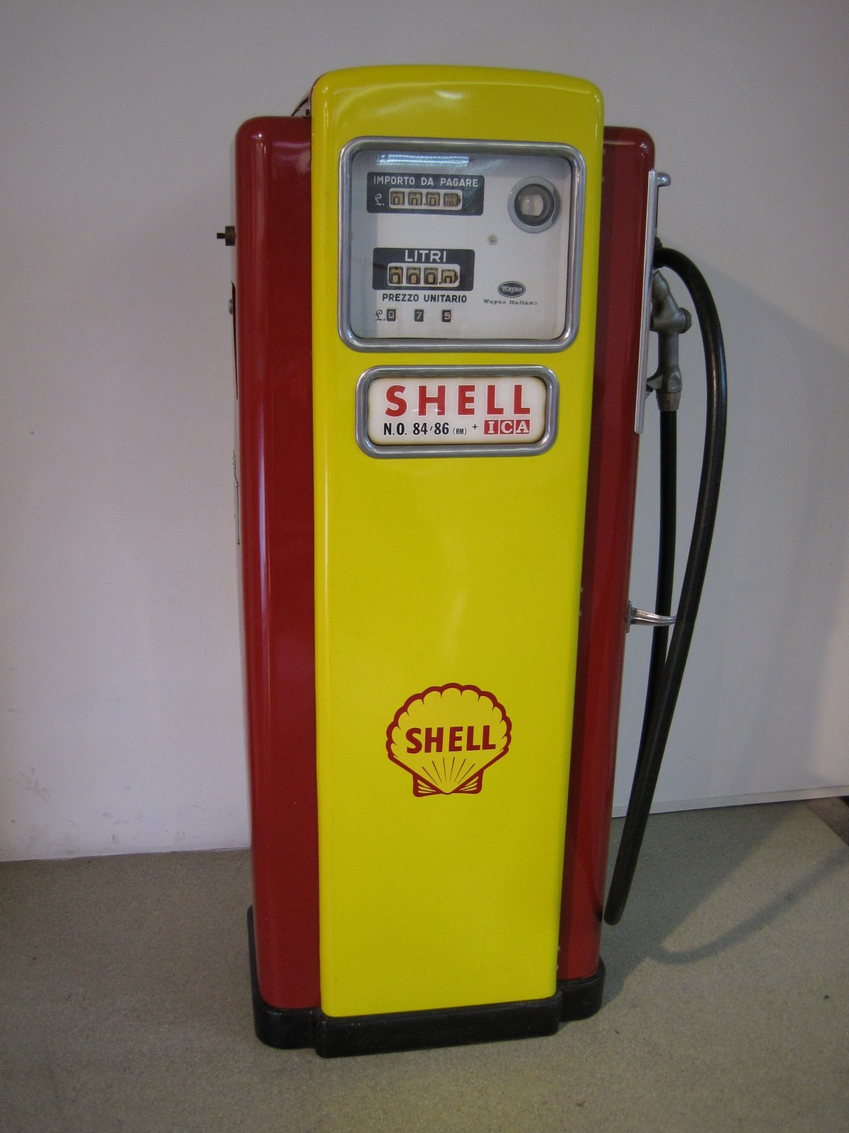 Collections of the Galleria Ferrari